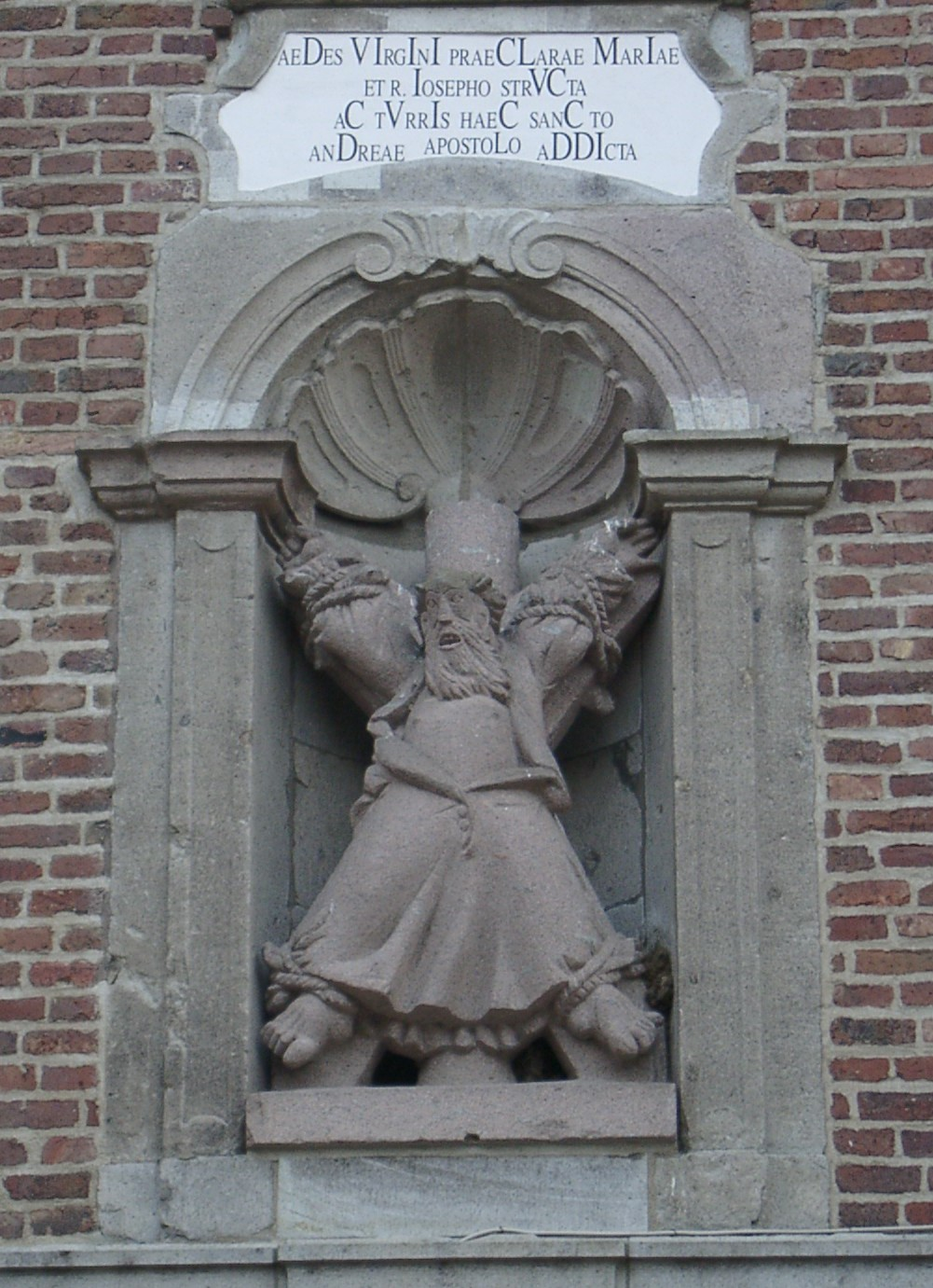 Apostel Andreas an der Pfarrkirche St. Andreas in Neuss-Norf - selbst fotografiert (Klaus Graf) 21.2.2005 - Lizenz: CC-BY